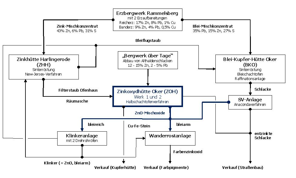 Stammbaum der Zinkoxydhütte Oker, Stand 1960er Jahre